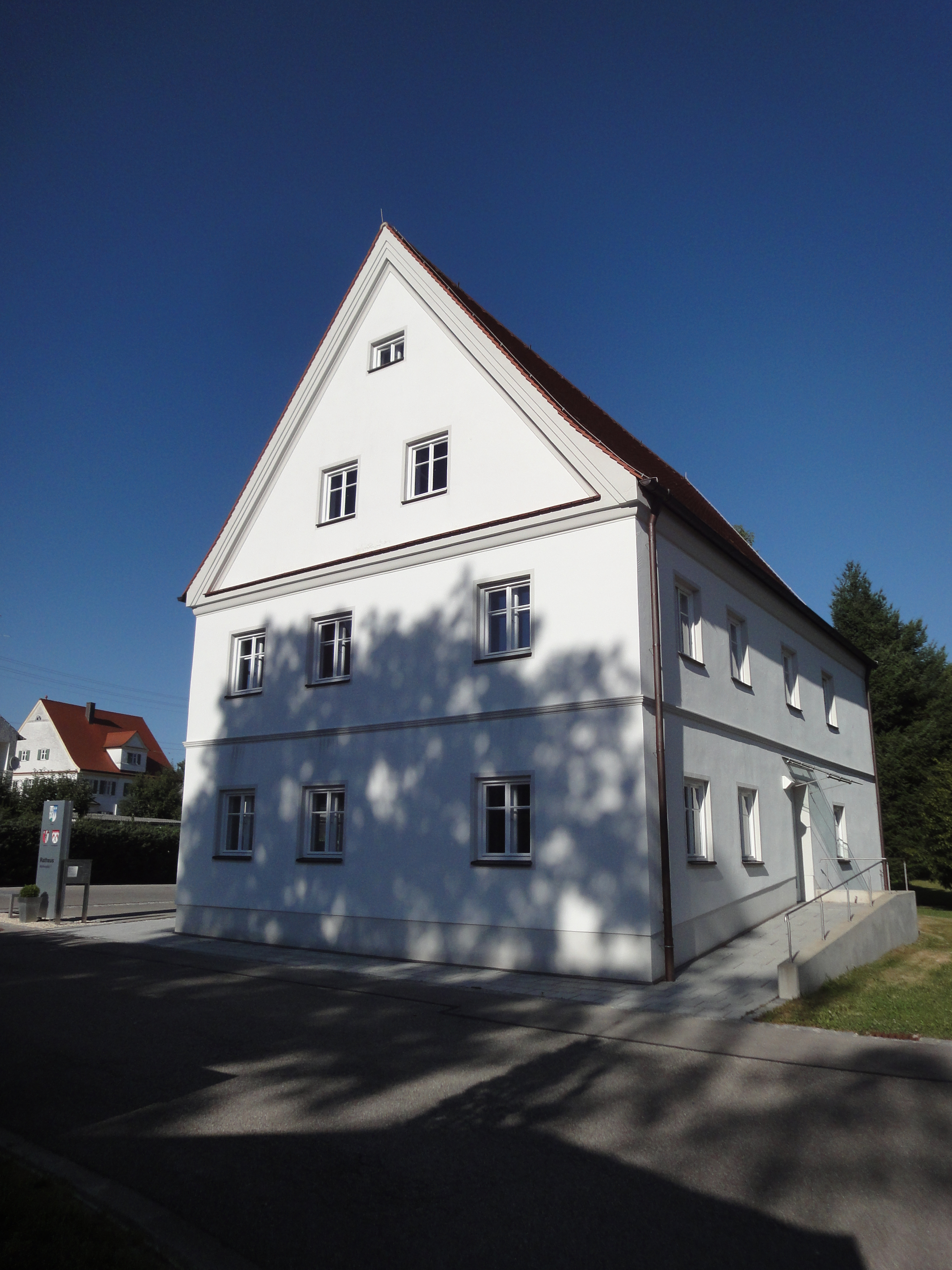 Rathaus Horgau, ehemaliges Pfarrhaus, Satteldachbau, 1694/95; mit Ausstattung.